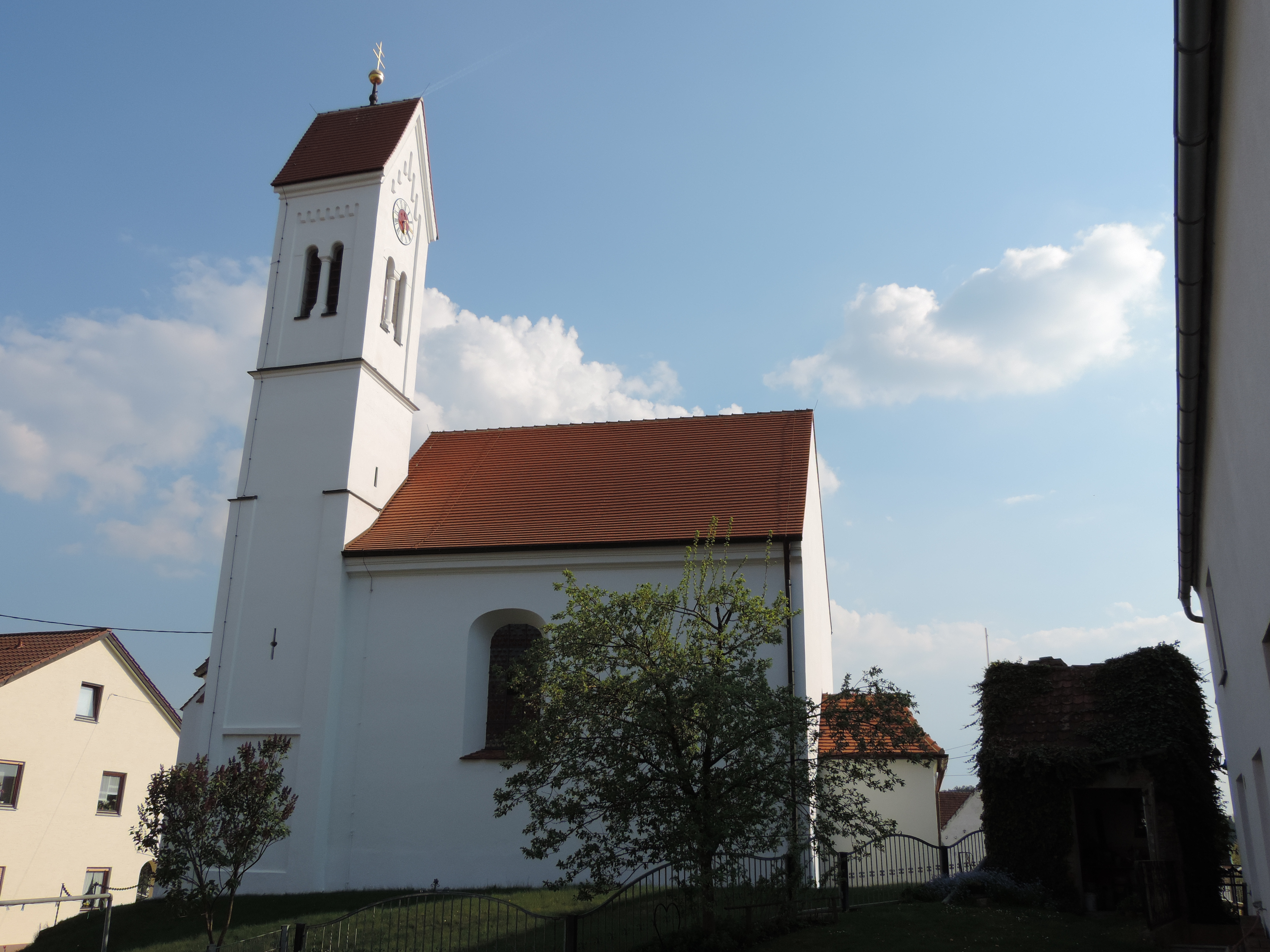 Langhaus romanisch, Chor und Turm 15. Jahrhundert, barockisiert; mit Ausstattung.